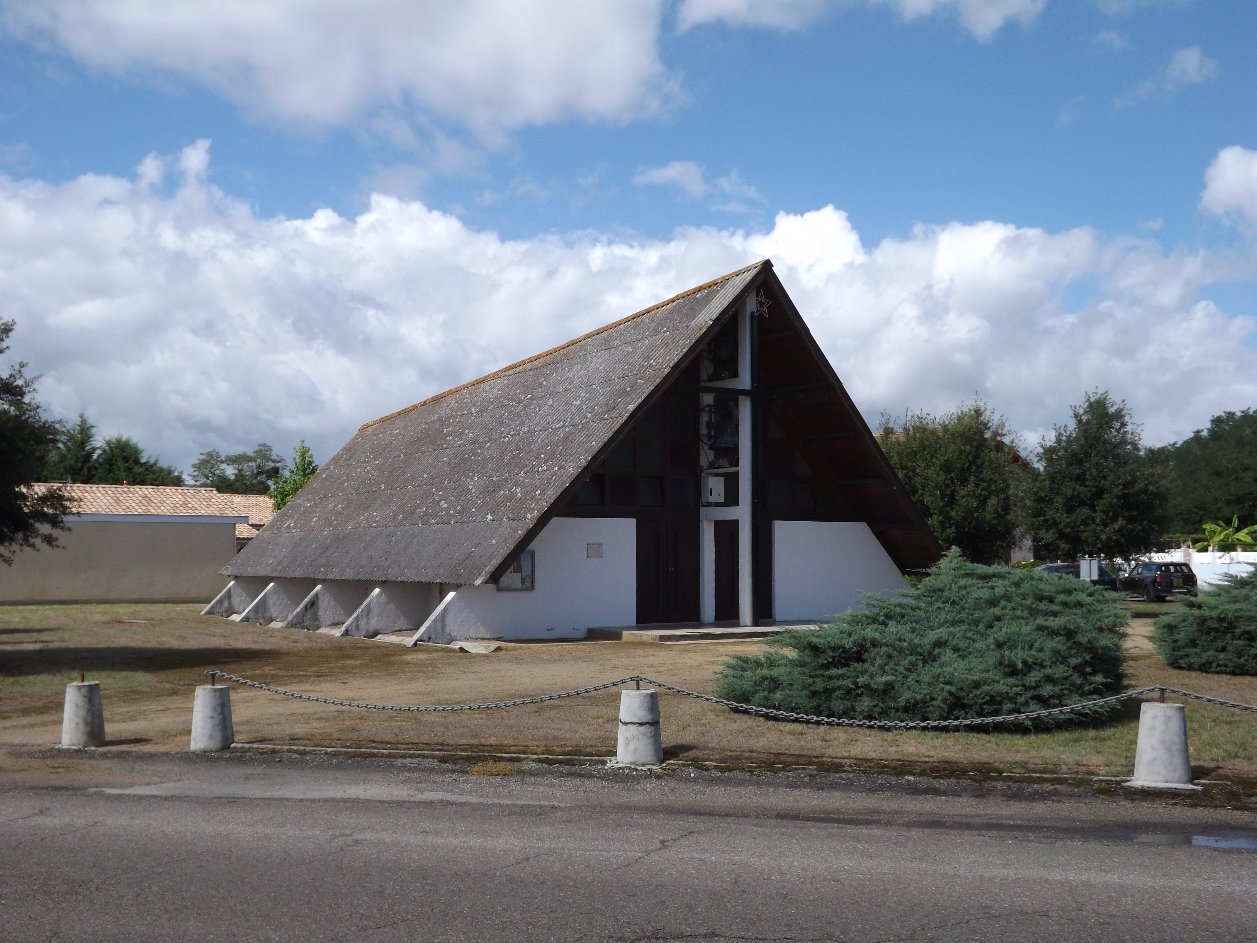 Glèisa de sent Laurenç d'Audon, Lanas, Gasconha